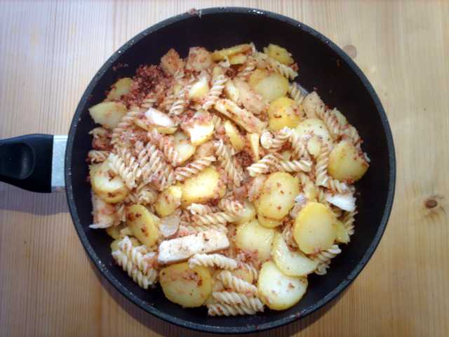 Grenadiermarsch (Küchengericht).